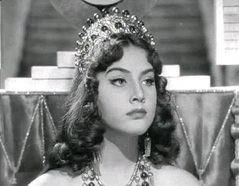 Scena del film La regina di Saba (1952)